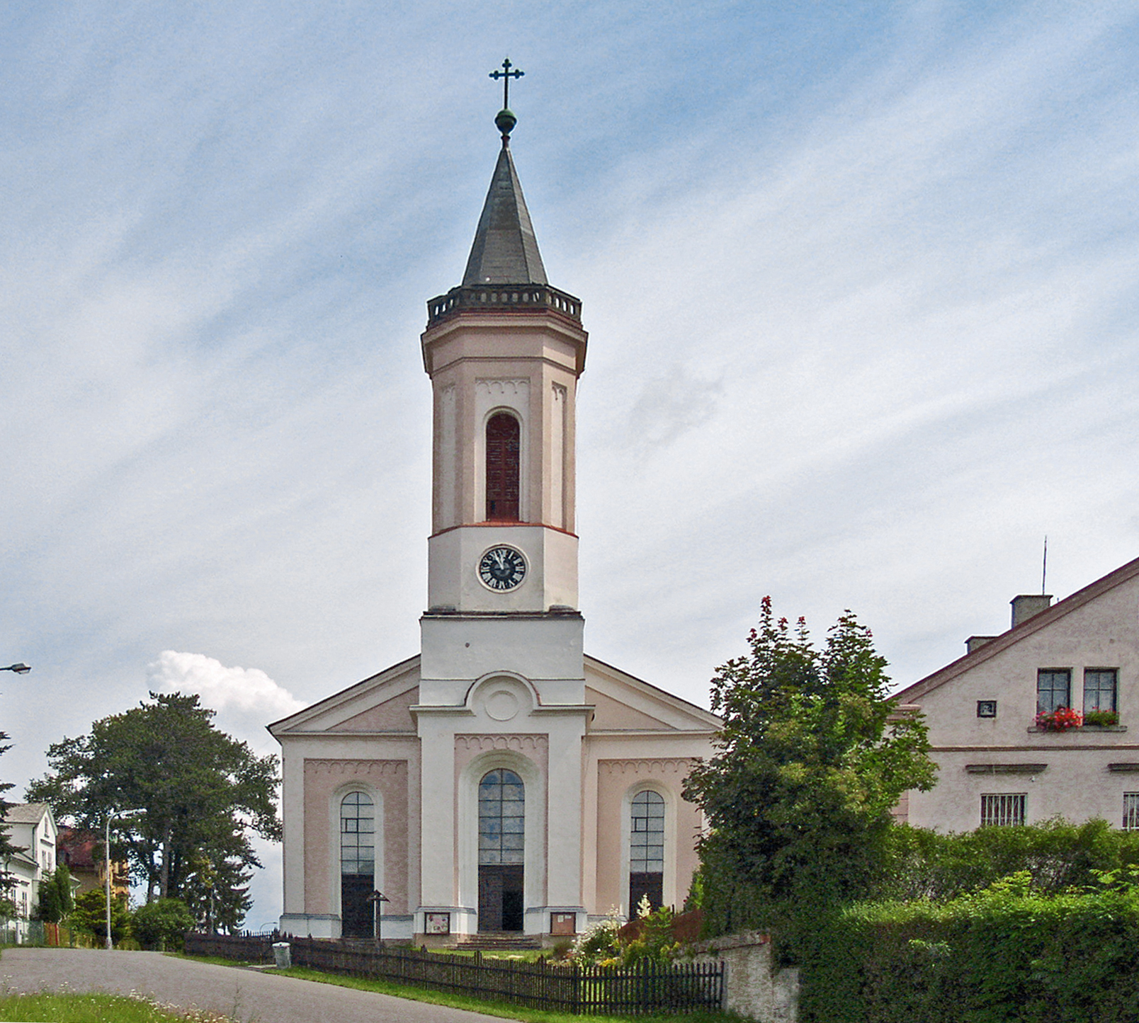 Starokatolický kostel ve Varnsdorfu, okres Děčín, Česká republika